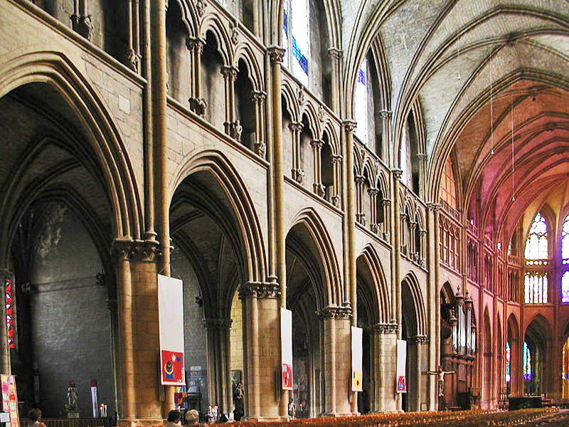 Katherale Nevers, Mittelschiff und Chor, Nordwand